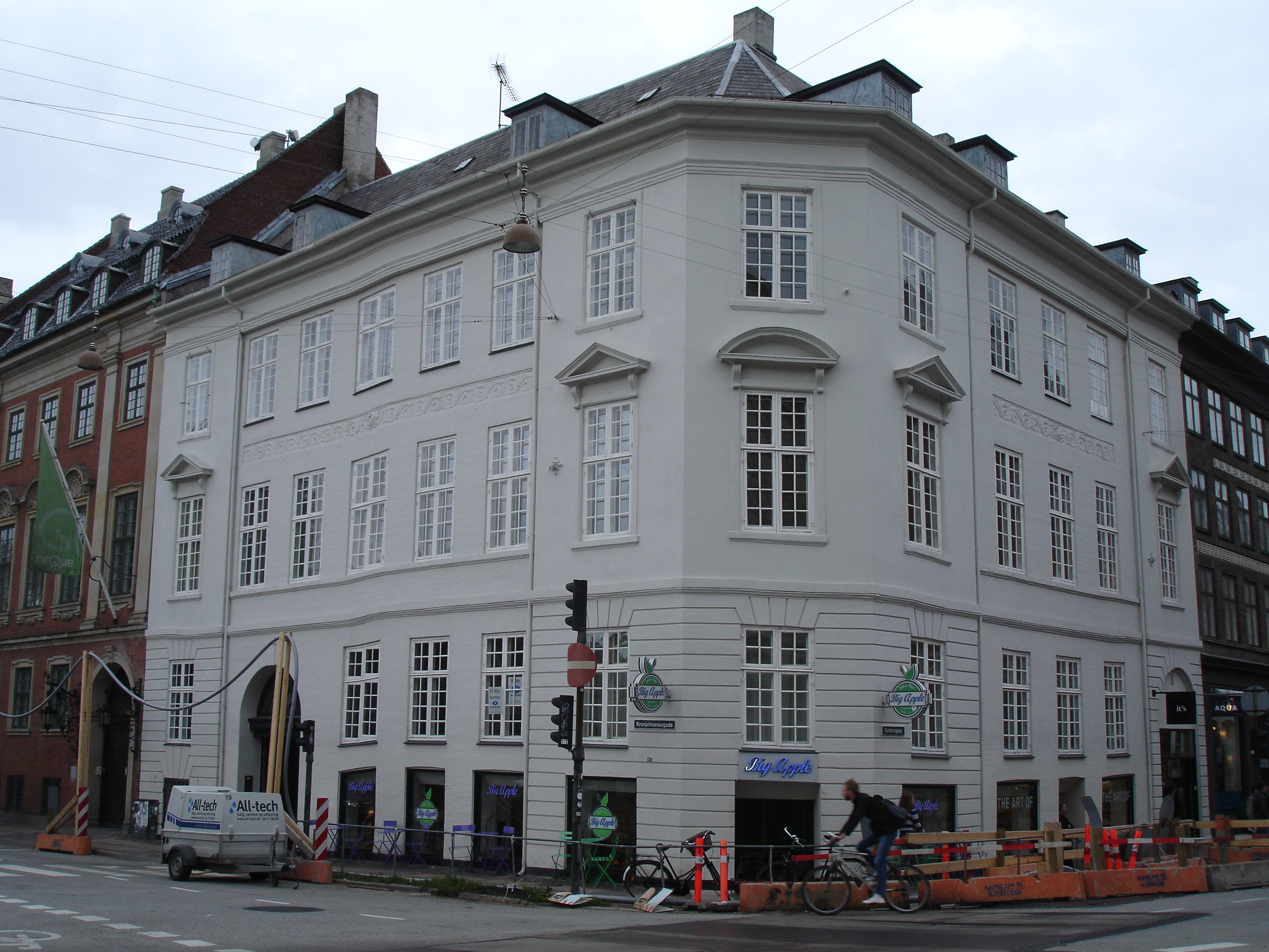 Lars Larsens Gård, København, Danmark